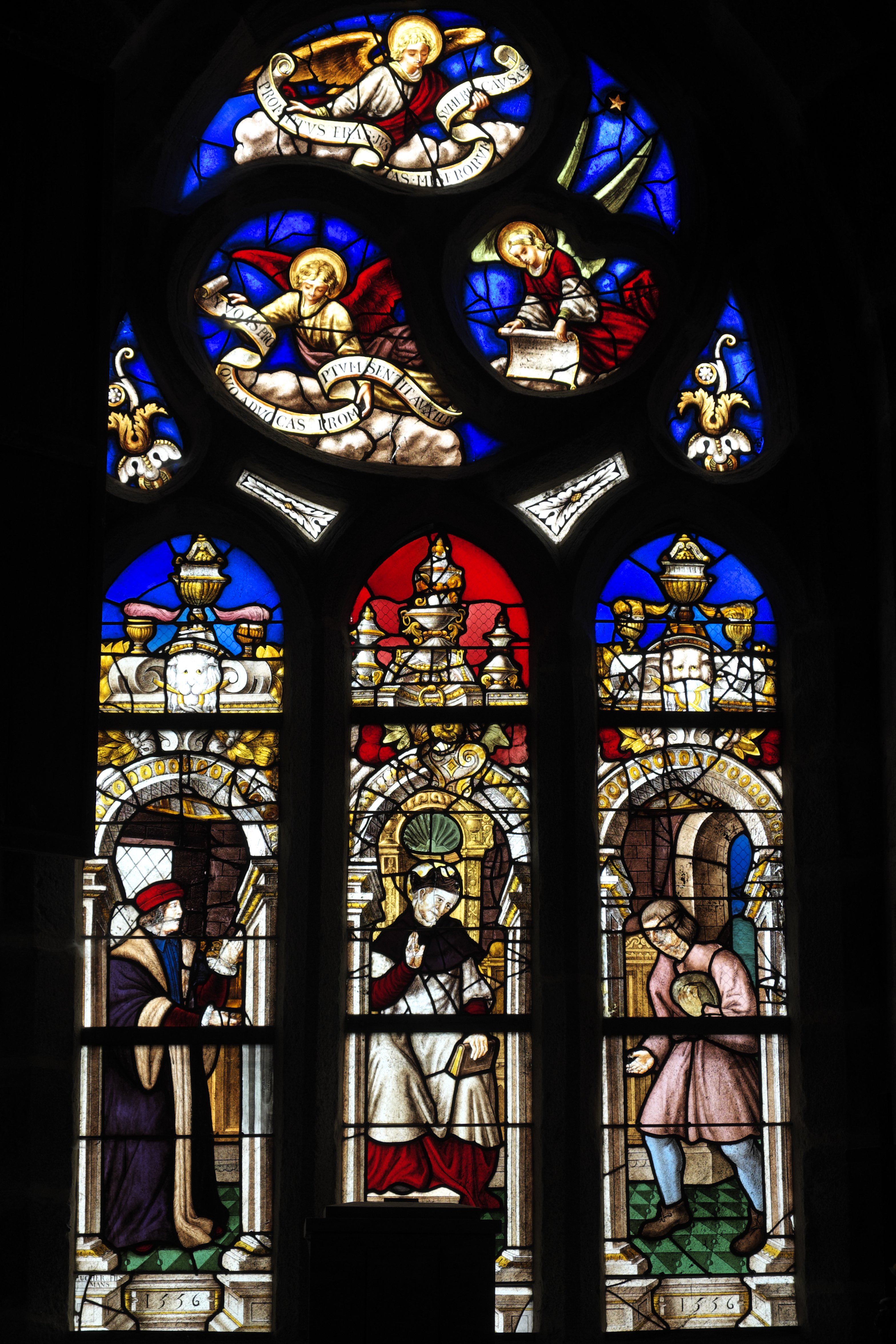 Fenster mit der Darstellung des Urteils des Ivo Hélory in der Kapelle Saint-Herbot in Saint-Herbot (Plonévez-du-Faou) im Département Finistère (Region Bretagne/Frankreich), Bleiglasfenster (baie 2) von 1556, 1886 von Eugène und Ferdinand Hucher in der Glasmalereiwerkstatt der Karmelitinnen von Le Mans restauriert